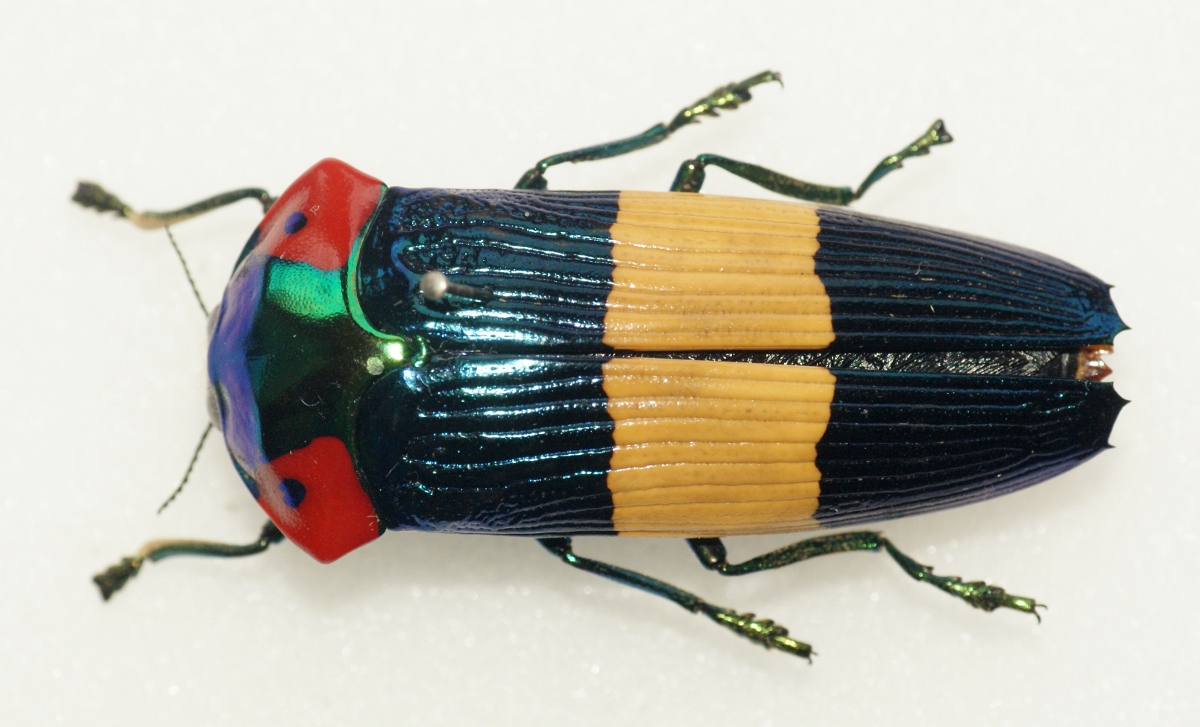 Van de Poll,1885 Sex: Male Data: Aseki Morobe Province - Papua New Guinea Size: ?